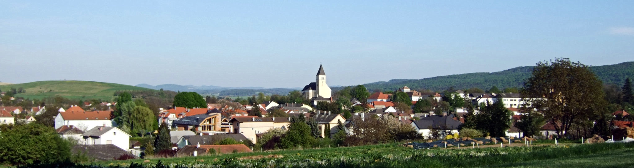 Marktgemeinde Böheimkirchen in Niederösterreich